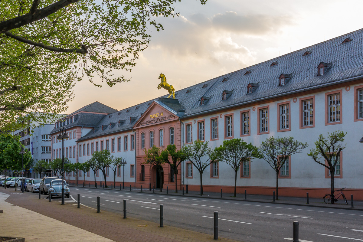 Das Landesmuseum in Mainz. Ansicht von der Großen Bleiche im Sonnenuntergang. Frühjahr 2013.